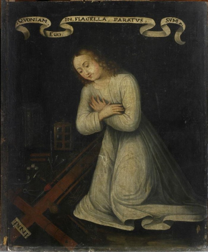 Неизвестный автор. Ребёнок Иисус на коленях перед орудиями Страстей («L'Enfant Jesus a genoux devant les instruments de la Passion (titre factice)»). Musée Sainte-Croix.